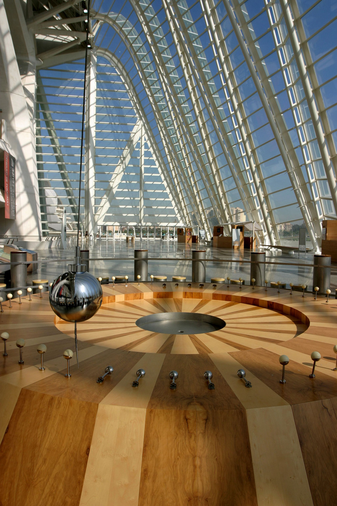 Ciudad de las Artes y las Ciencias. Valencia